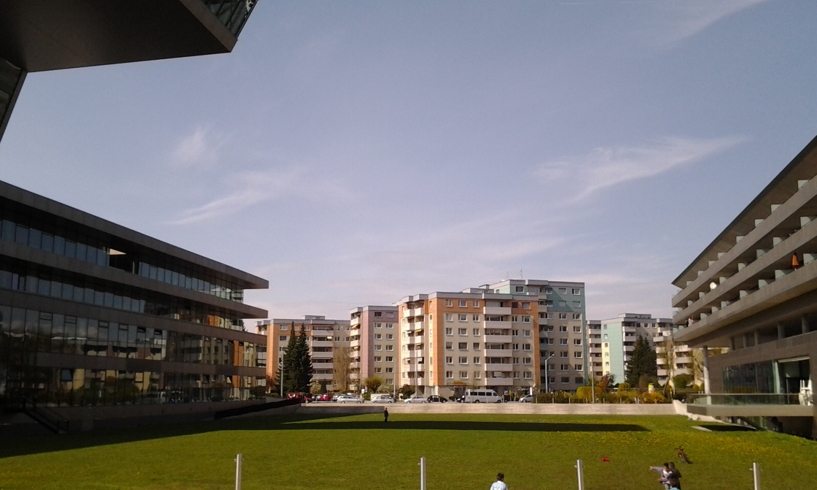 Neue Mitte Lehen, ein Komplex von Wohn- und Zweckgebäuden im Salzburger Stadtteil Lehen; im HIntergrund schon zuvor bestandene Wohnbauten.